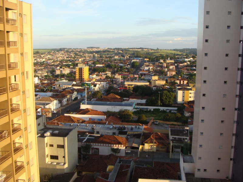 Vista do Hhotel em São Carlos.